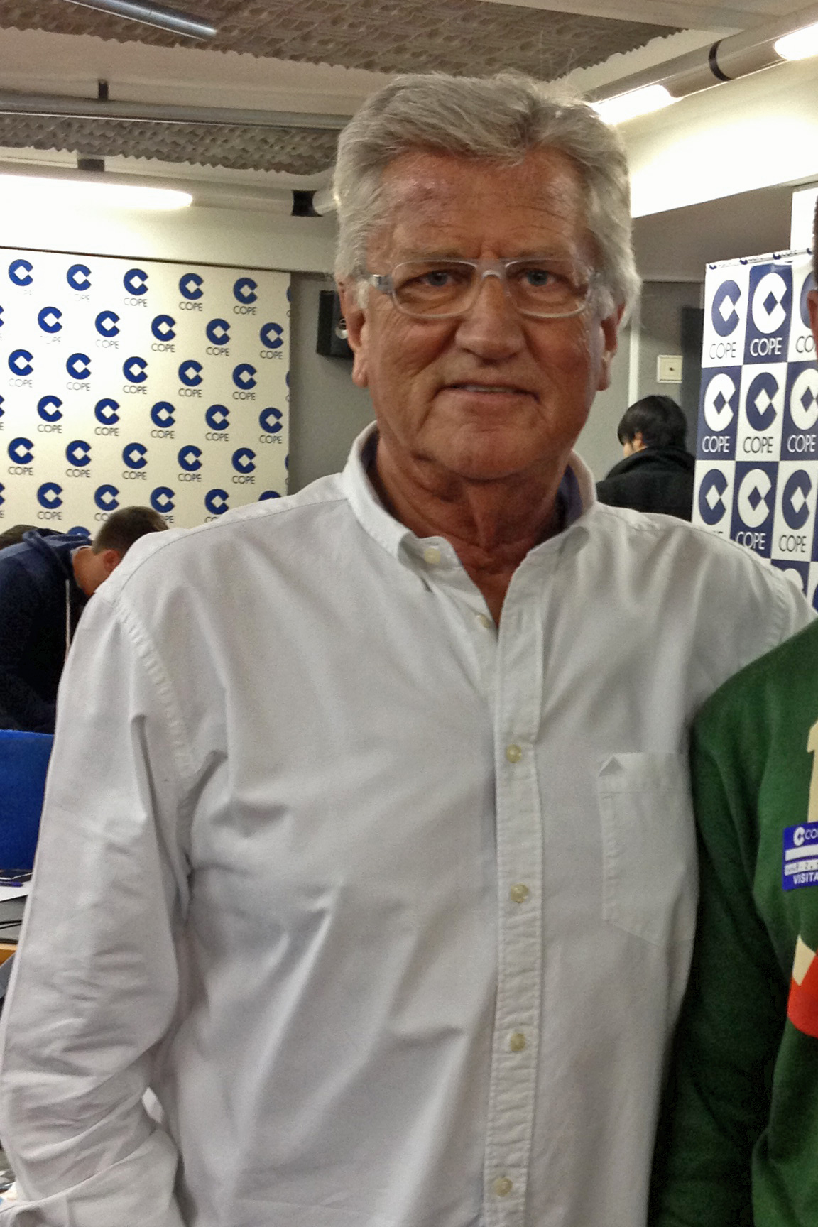 Pepe Domingo Castaño, periodista español